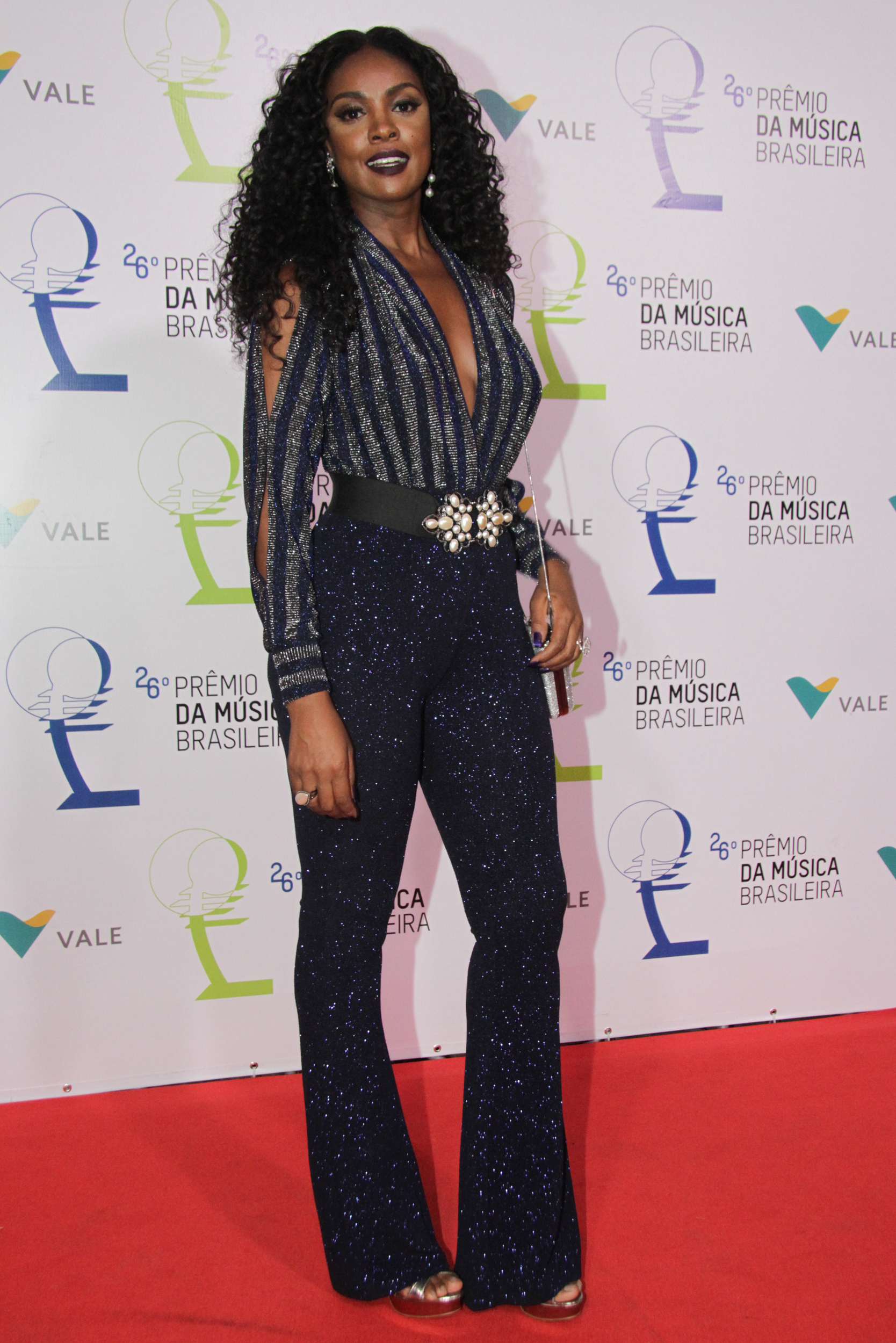 Cris Vianna - 26° Prêmio da Música Brasileira 2015, no Theatro Municipal, no Centro do Rio de Janeiro/RJ. (10/06/15) Foto: Roberto Valverde/Divulgacão